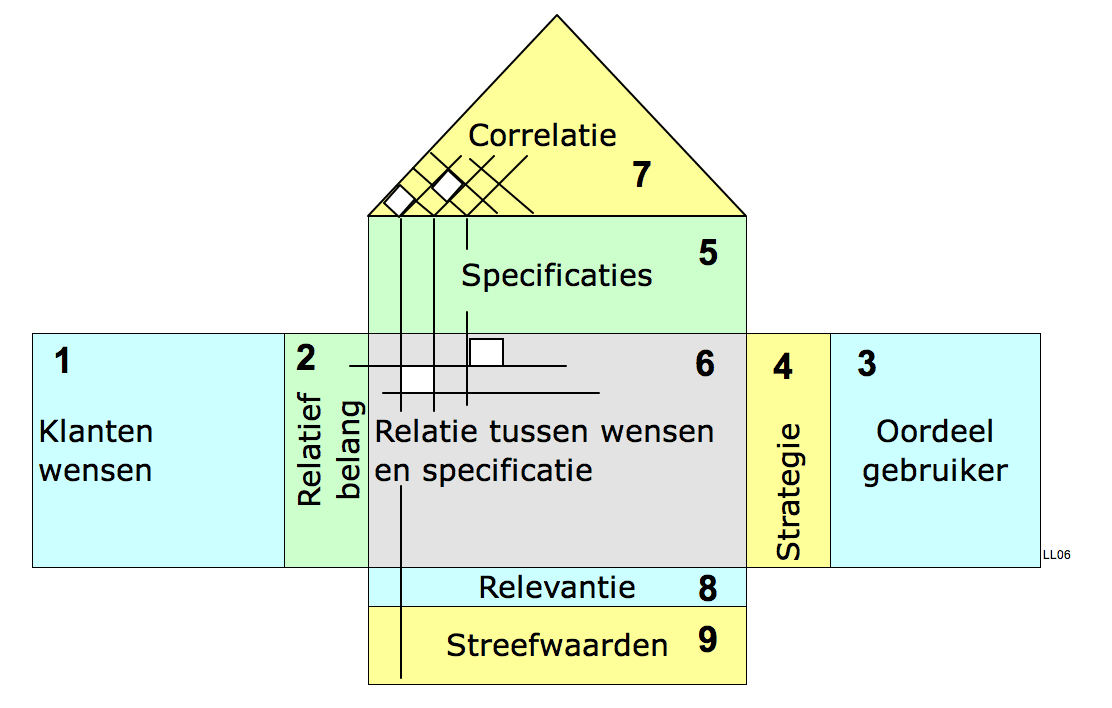 Het kwaliteitshuis. juli 2006 Laurens van Lieshout. Quality_function_deployment